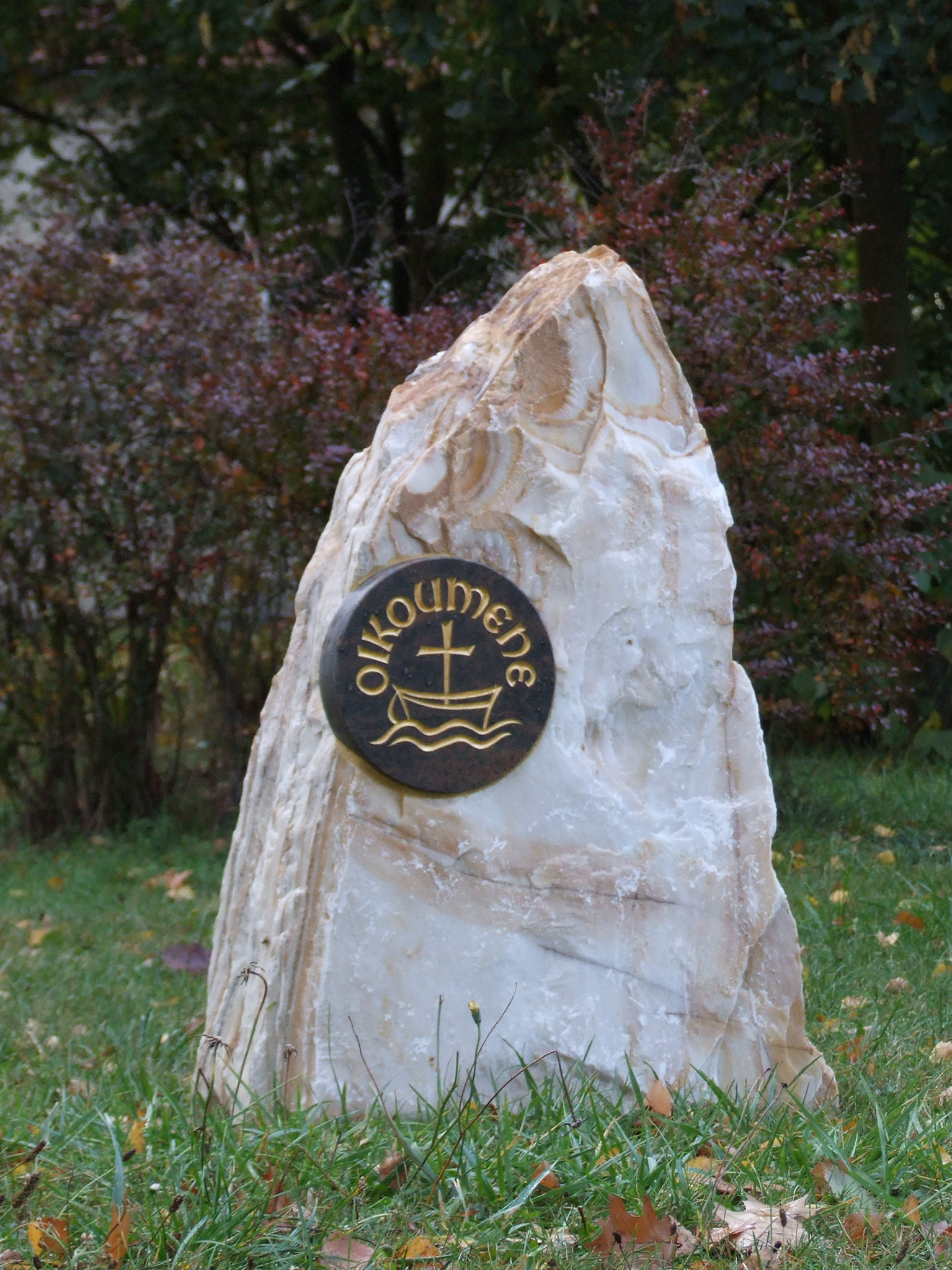 Ökumene-Stein der evangelischen Kirchengemeinde und der katholischen Pfarrei Memmelsdorfs